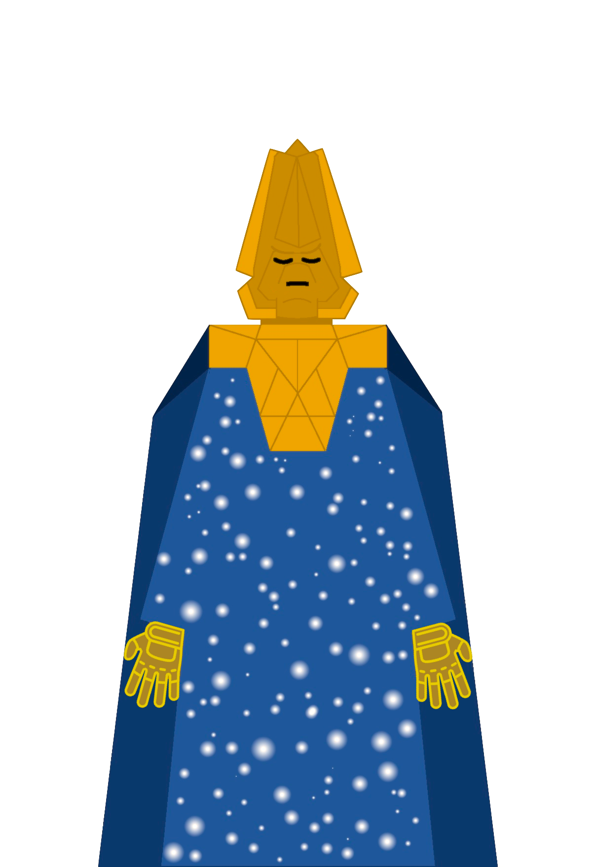 A computer drow of Omega, from the TV show Doctor Who